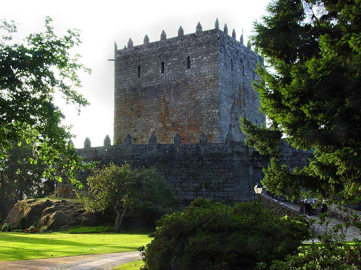 Castelo de Soutomaior, provincia de Pontevedra